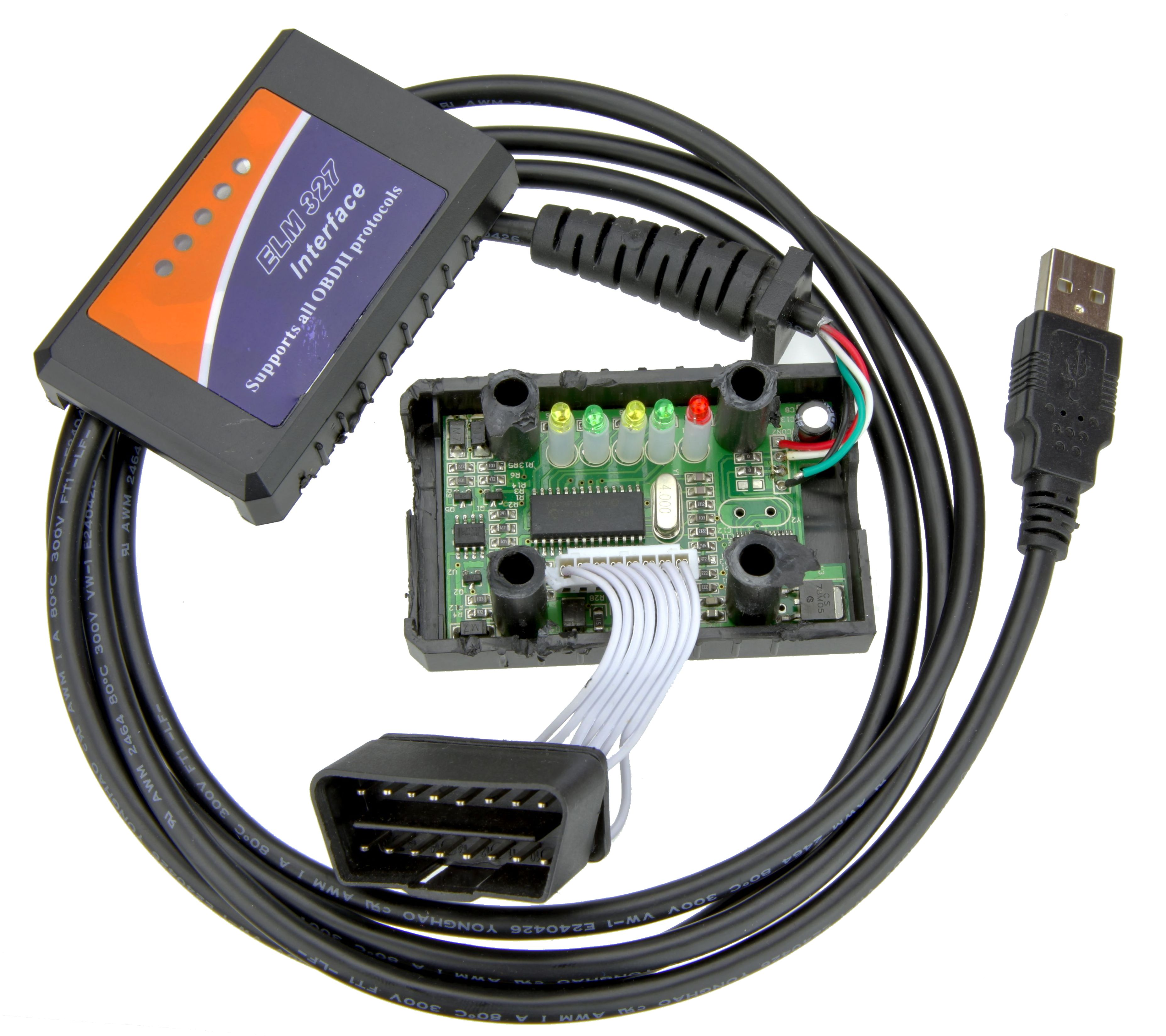 Typical ELM327 clone without label on the controller contributor